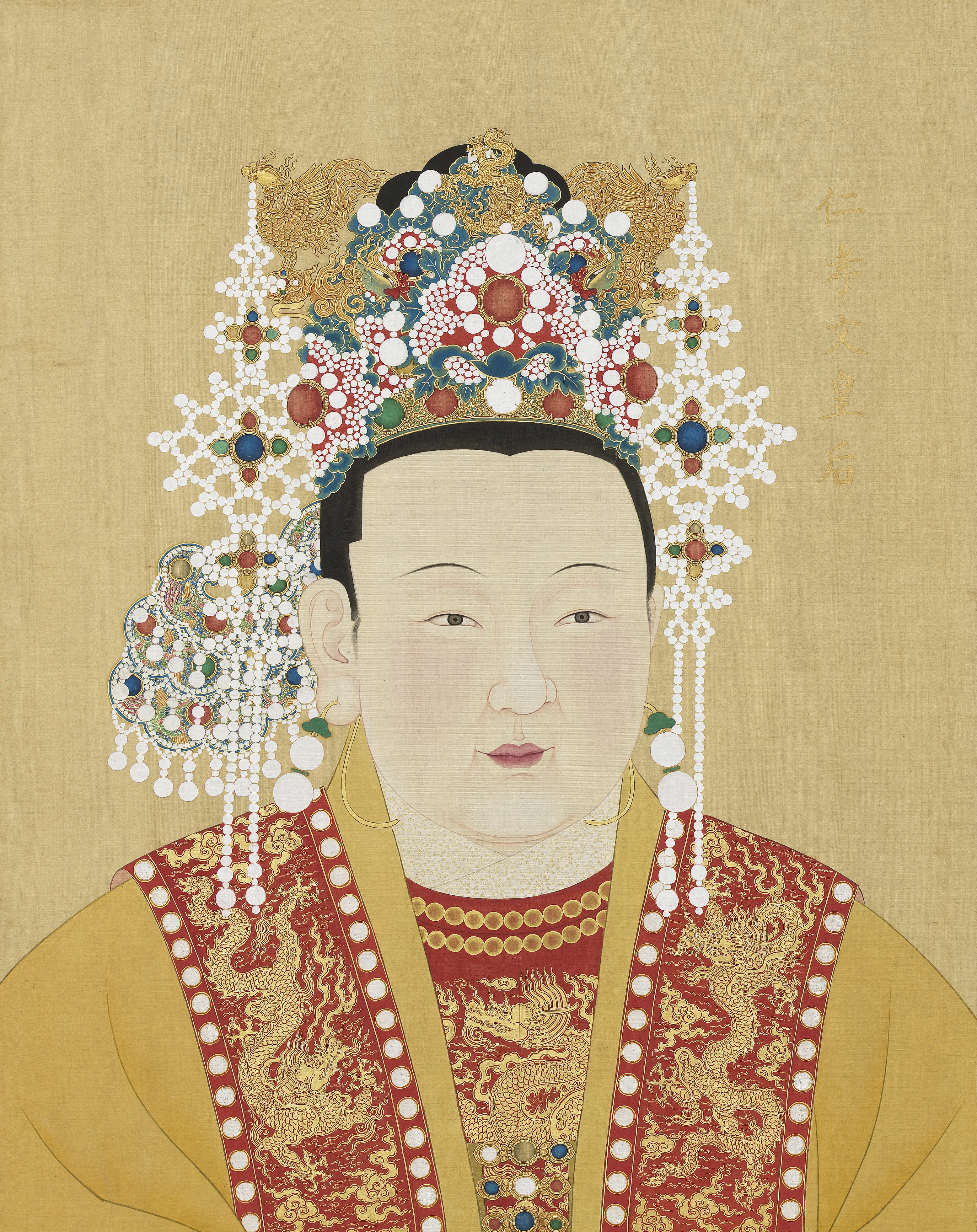 中文（中国大陆）: 作者已经去世超过200年，作品已经进入公有领域。